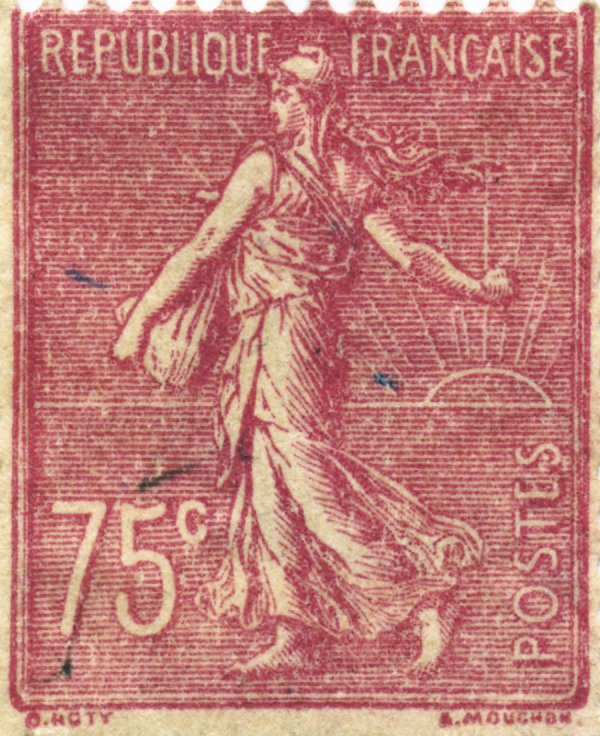 Semeuse lignée Contents 1 Source 2 Licensing 3 Licensing 4 Original upload log Source Yann Licensing Semeuse lignée